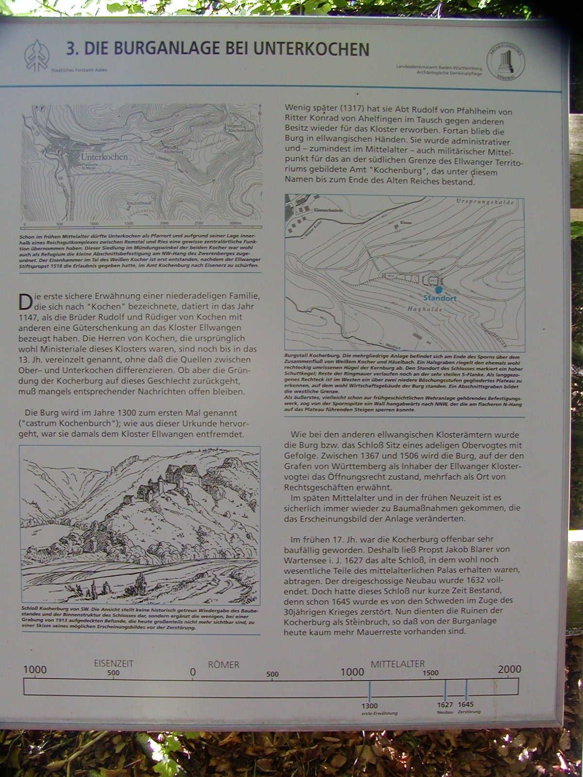 Infotafel bei der Ruine Kocherburg mit einer Rekonstruktionszeichnung die von Koch kopiert wurde.